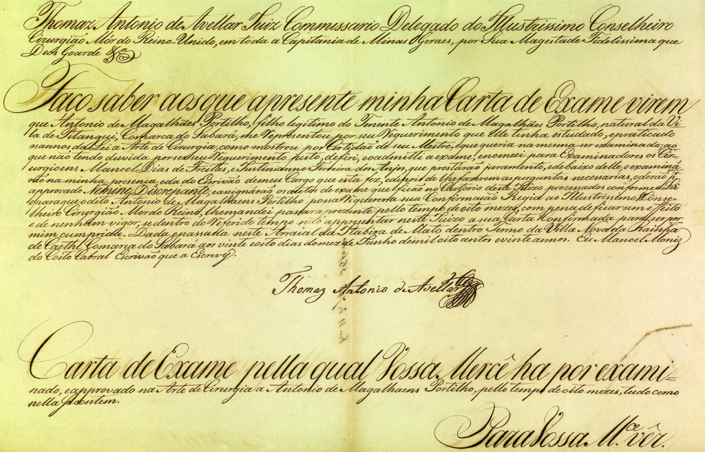 Fundo Correio da Manhã.